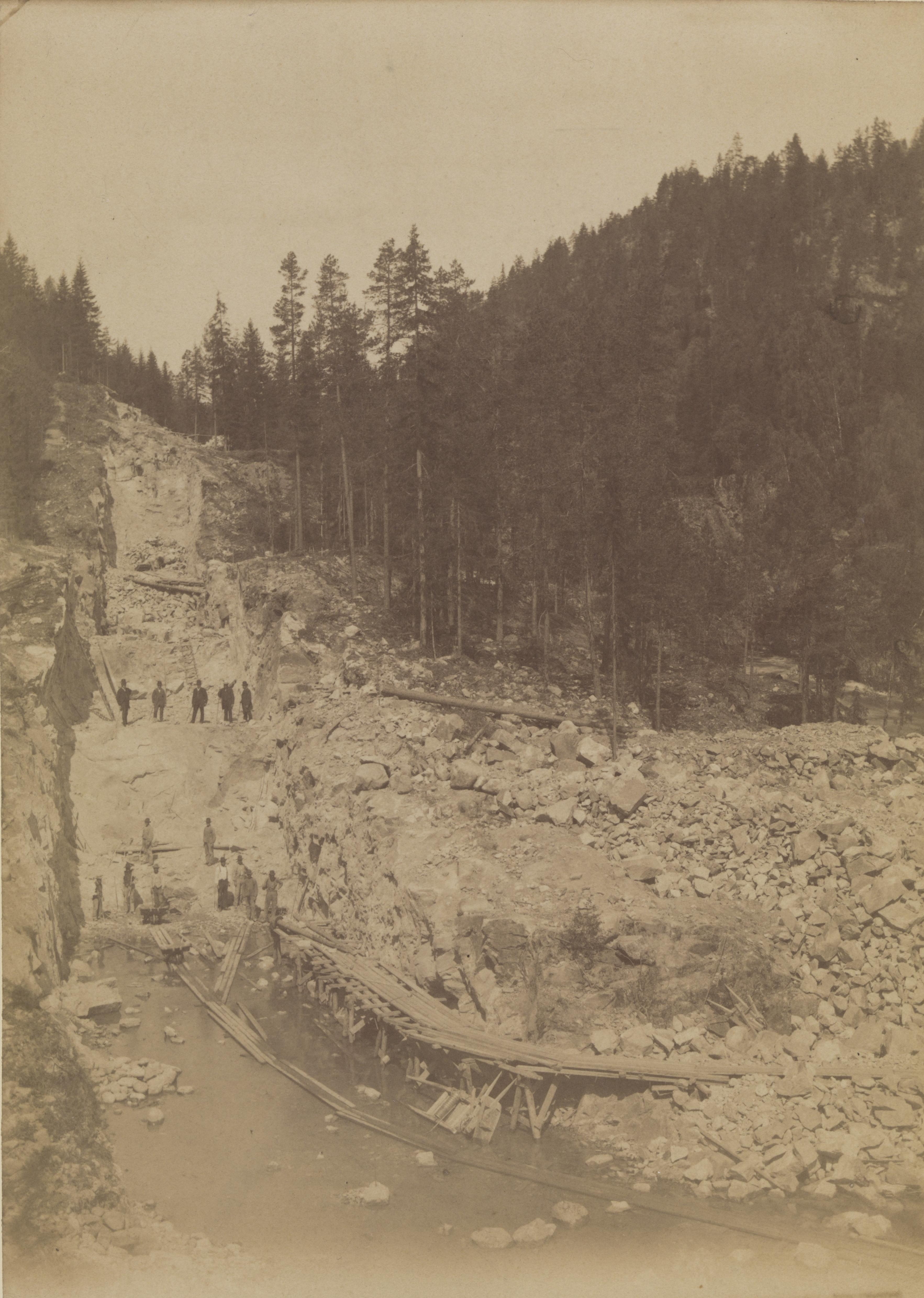 Bildet er hentet fra Nasjonalbibliotekets bildesamling